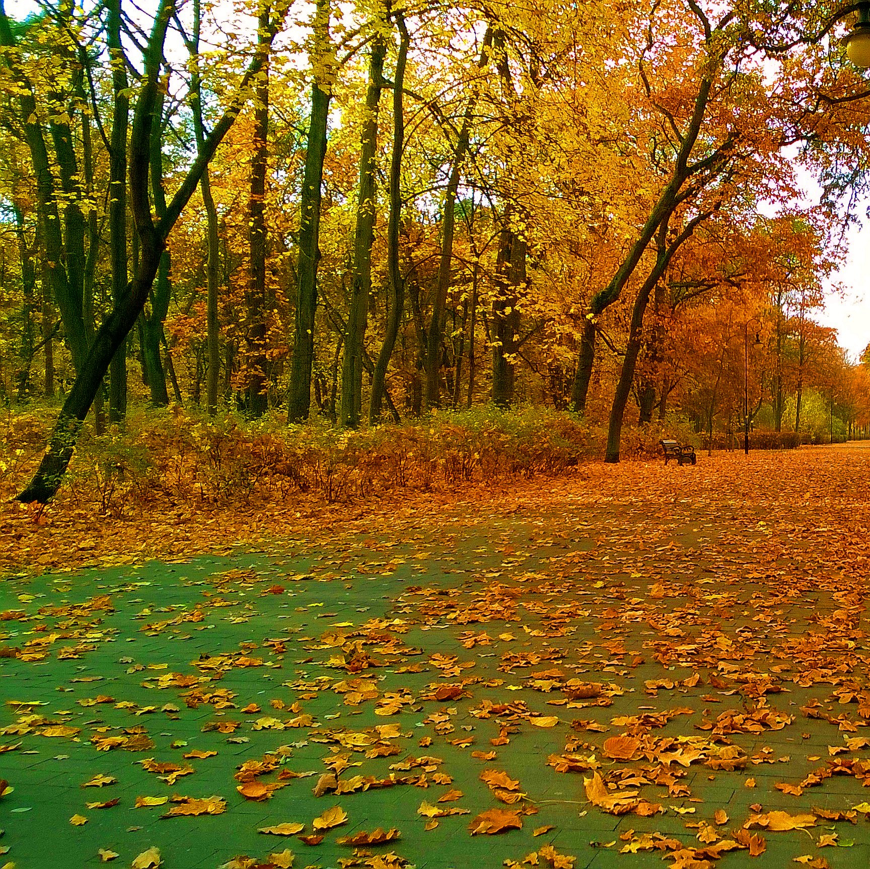 Park Miejski jesienią,Toruń5